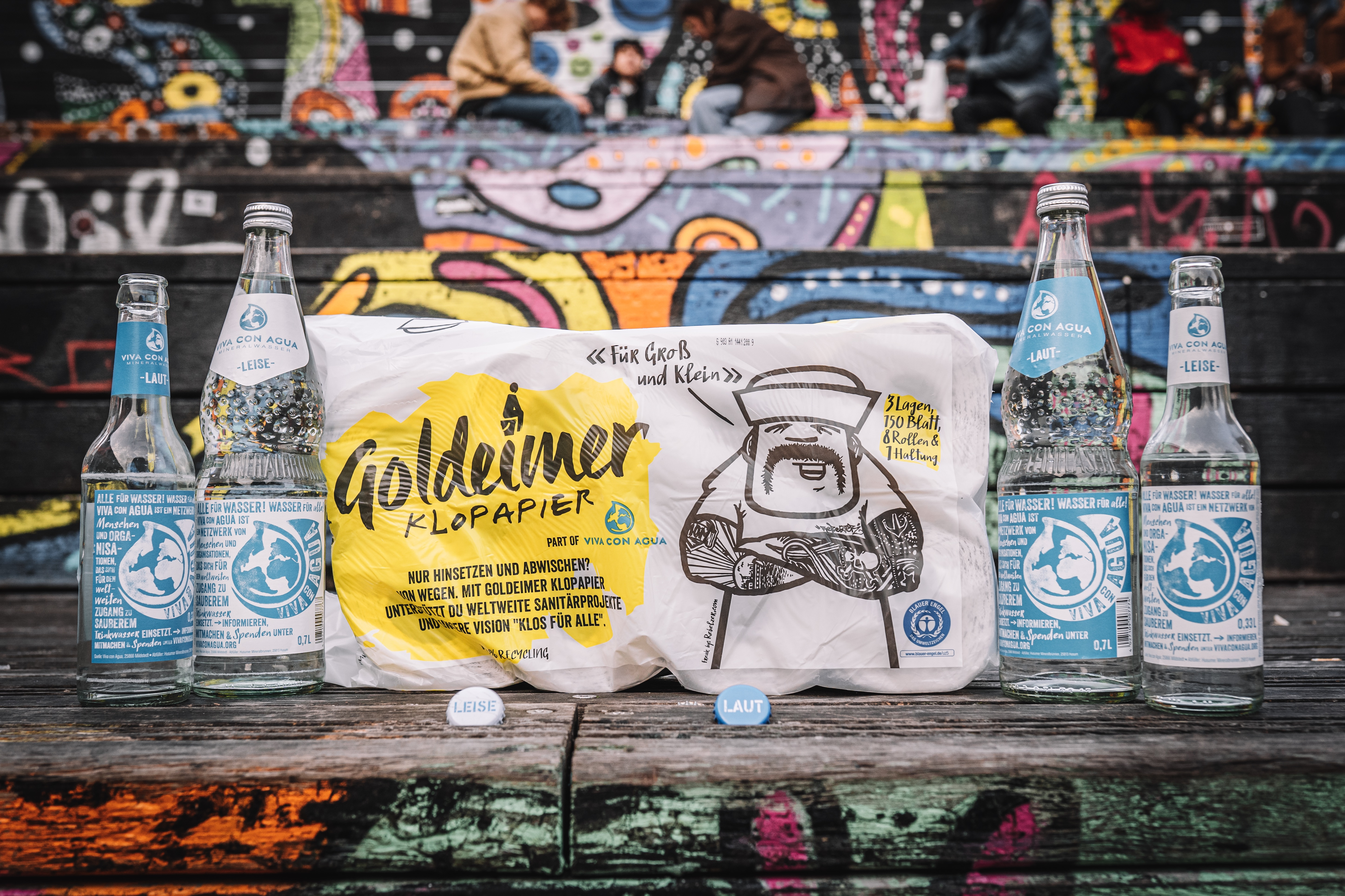 Goldeimer Klopapier trifft Vica con Agua Mineralwasser